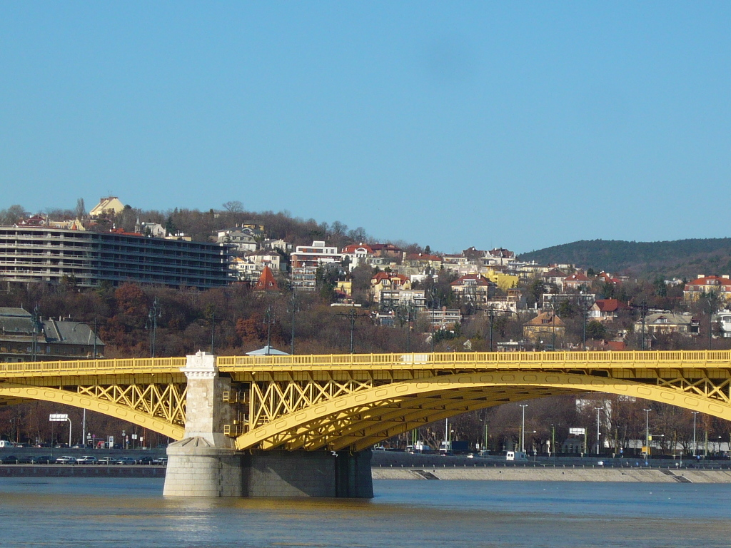 Margaret Bridge, Budapest